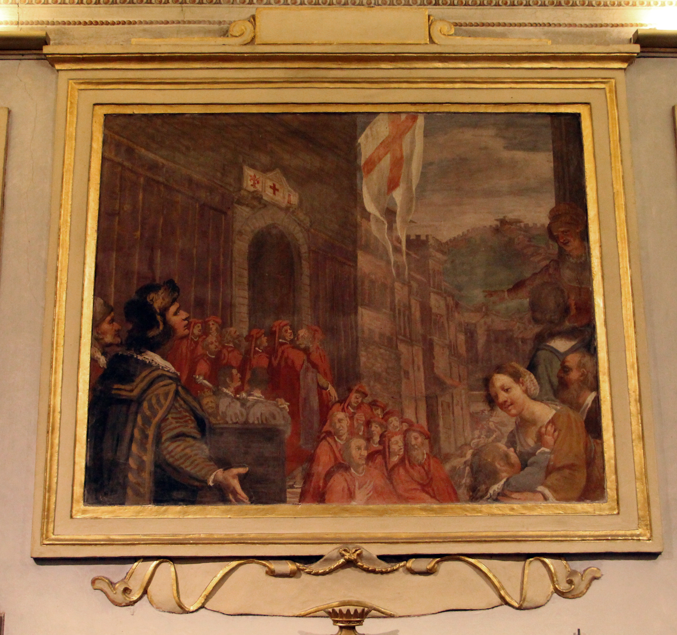 Casa Buonarroti - Camera della Notte e Dì